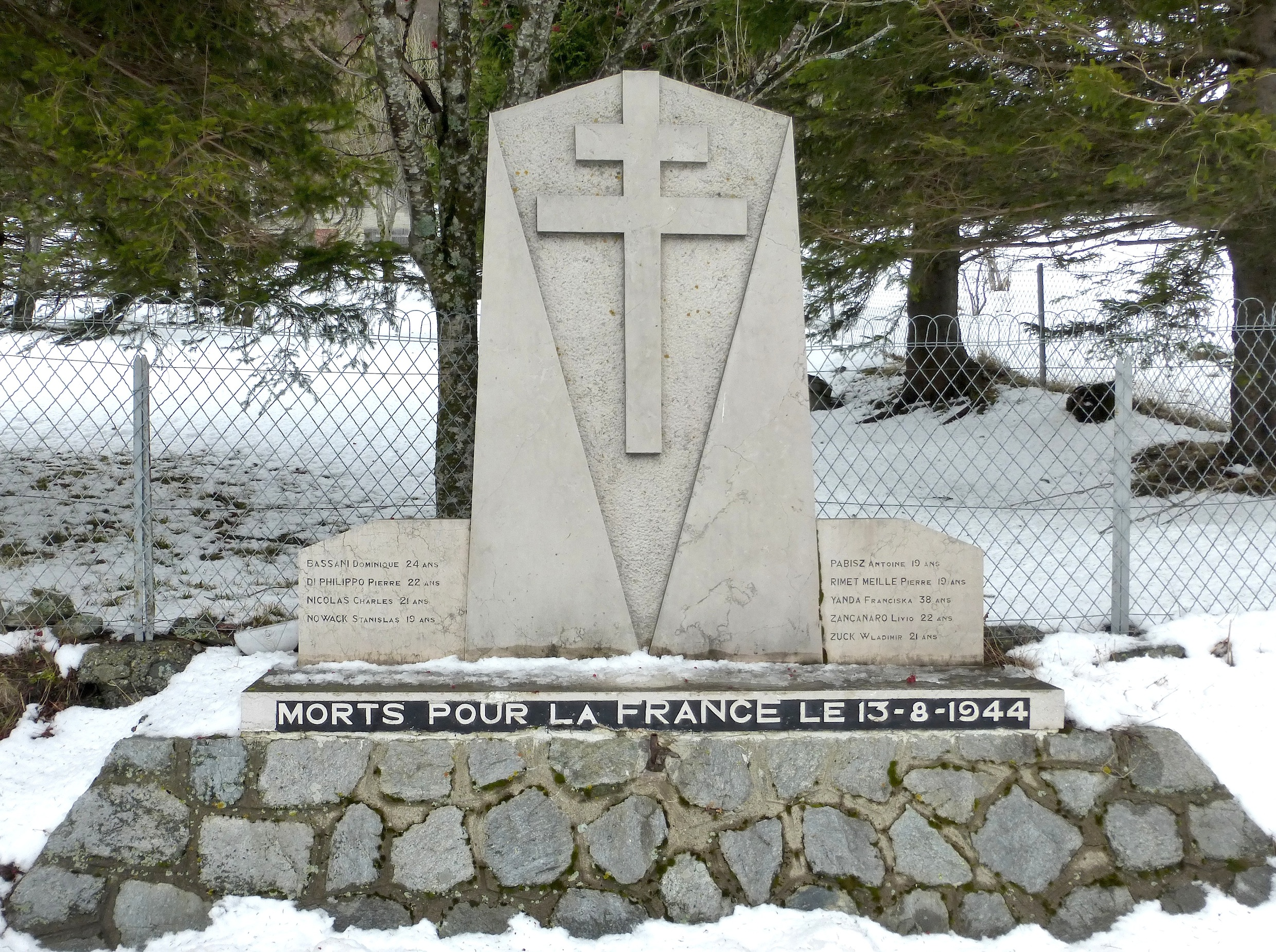 Monument aux Morts rendant hommage aux maquisards fusillés à La Morte le 13 août 1944. Janvier 2014 La Morte (Isère, France)